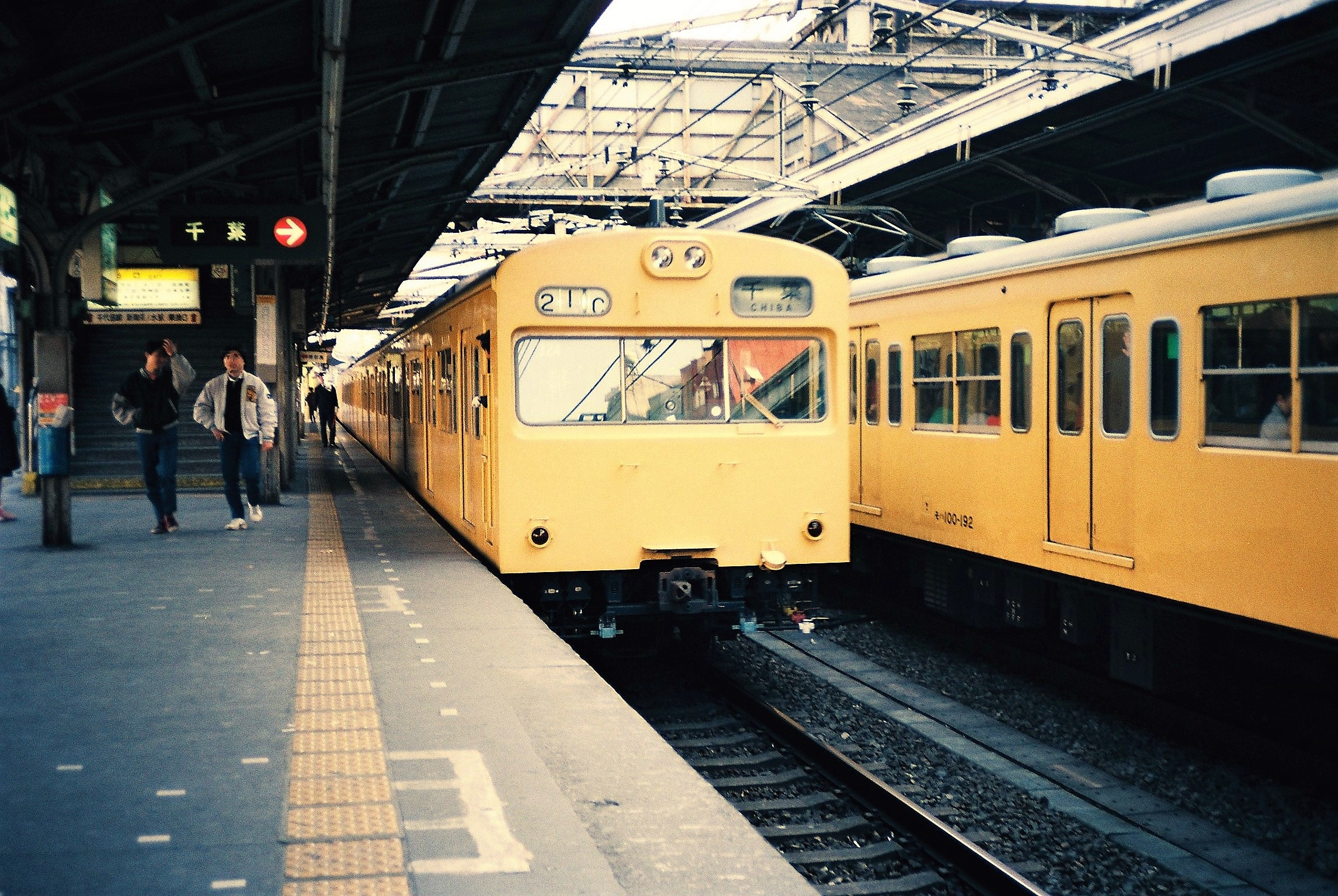 御茶ノ水駅の中央・総武緩行線103系（左）と101系（右）（1987年2月撮影）